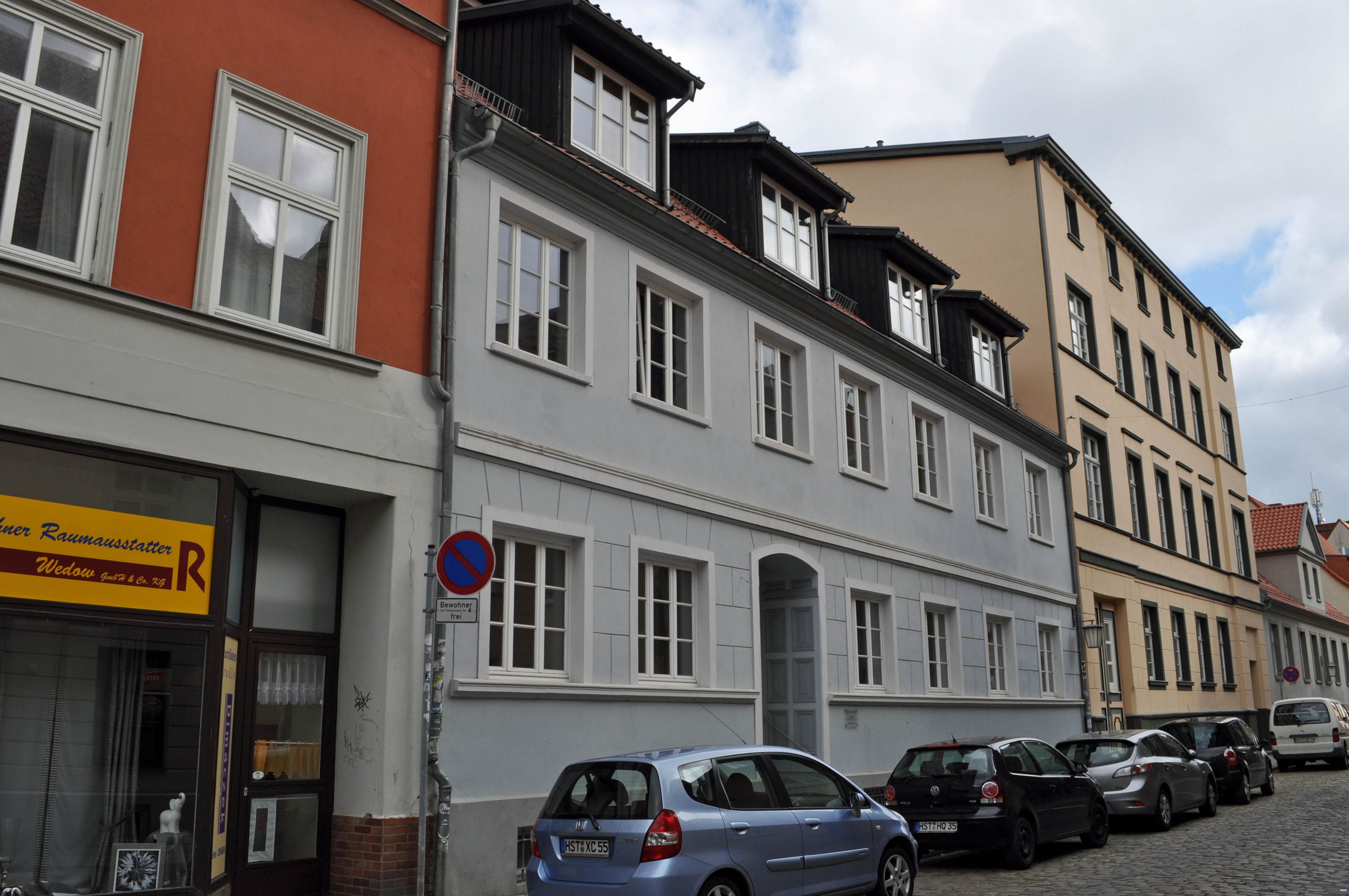 Gebäude in Stralsund, siehe Dateiname